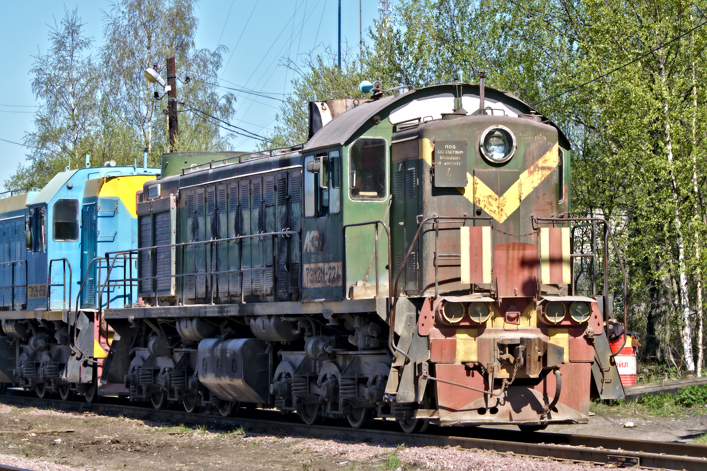 ТЭМ2М-0224. см. фото 618471 в альбоме автора